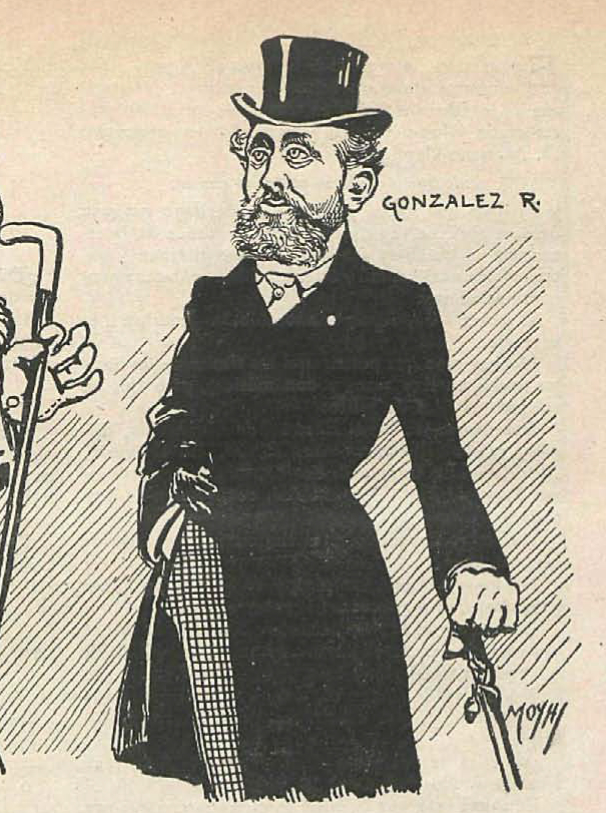 Después del atentado.